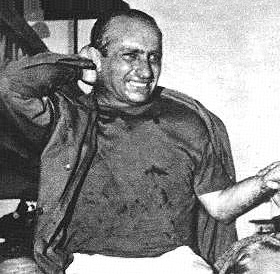 Juan Manuel Fangio, llevado en andas luego de su triunfo en Nürburgring en el año 1957